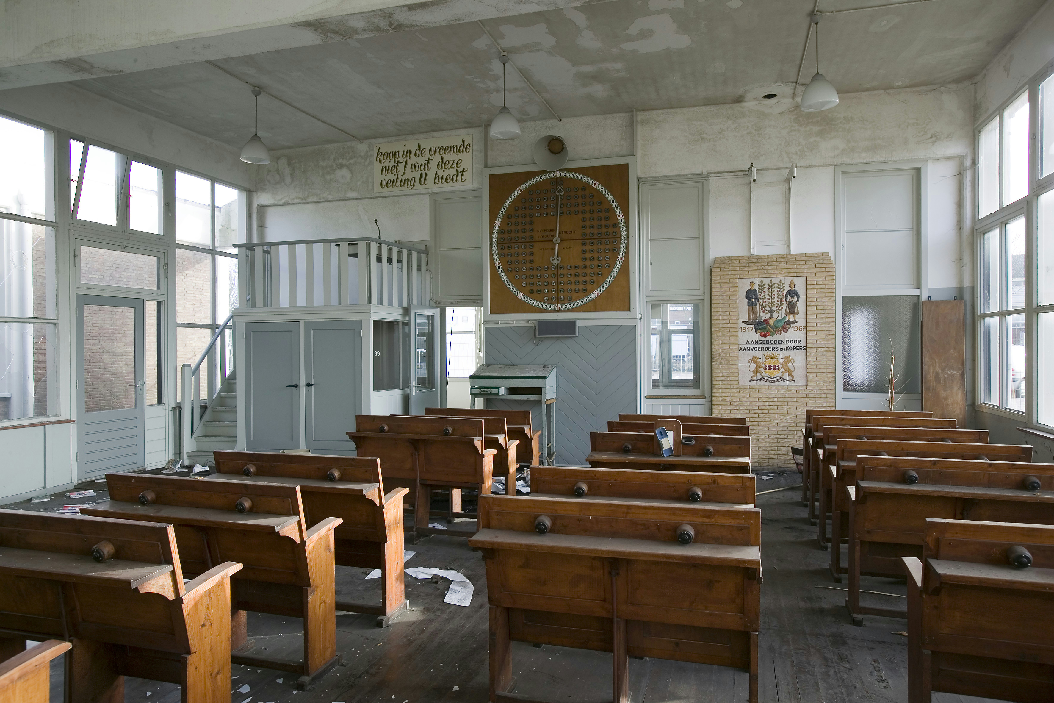 Fruitveiling: Interieur, overzicht van het veilinglokaal, richting de veilingklok (opmerking: Veilinggebouw is kort na de opname gesloopt)